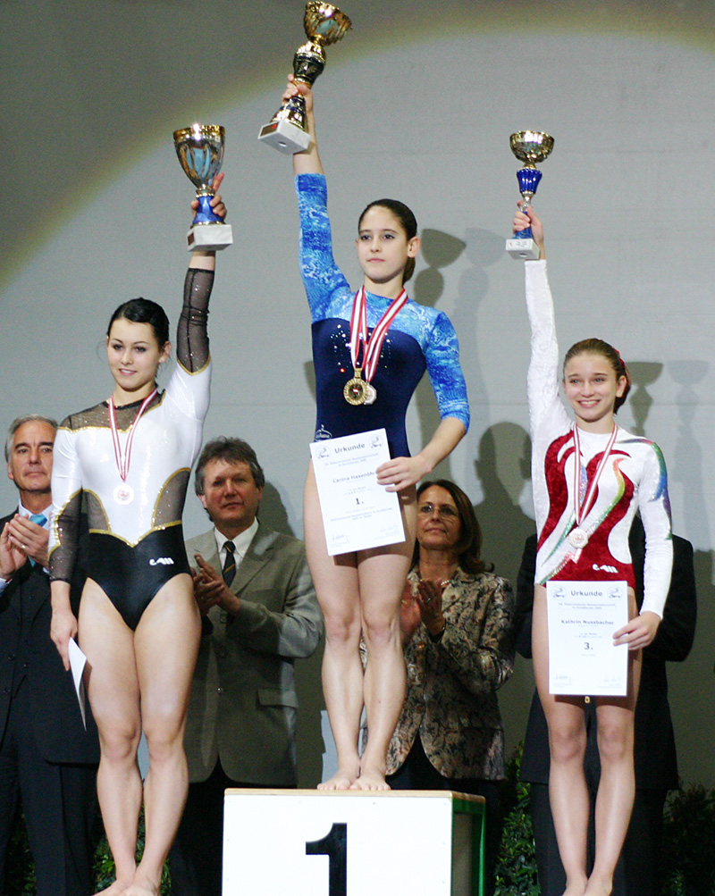 Kunstturnerin Carina Hasenöhrl siegt bei einem Gerätefinale der Kunstturn-Staatsmeisterschaften 2005 in Wien.